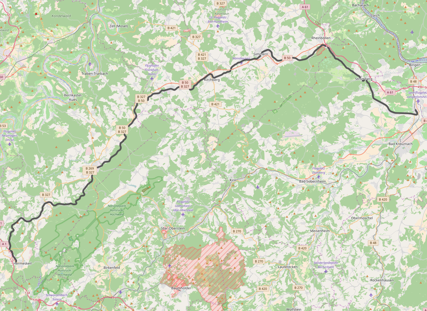 DB 3021, Langelonsheim - Hermeskeil